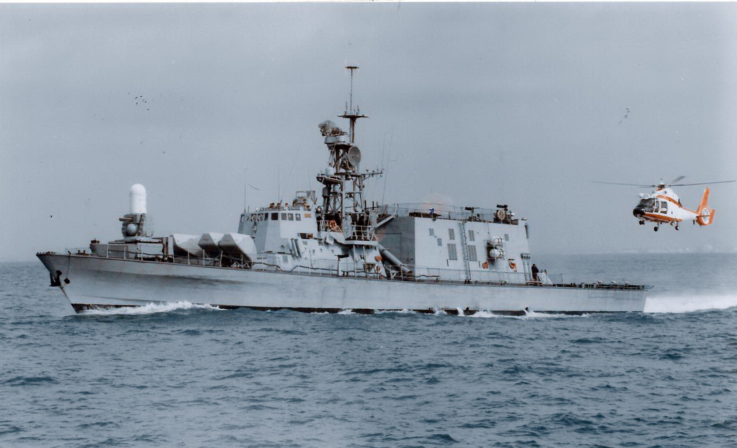 מסוק דולפין מתקרב לנחיתה על ספינת חותית